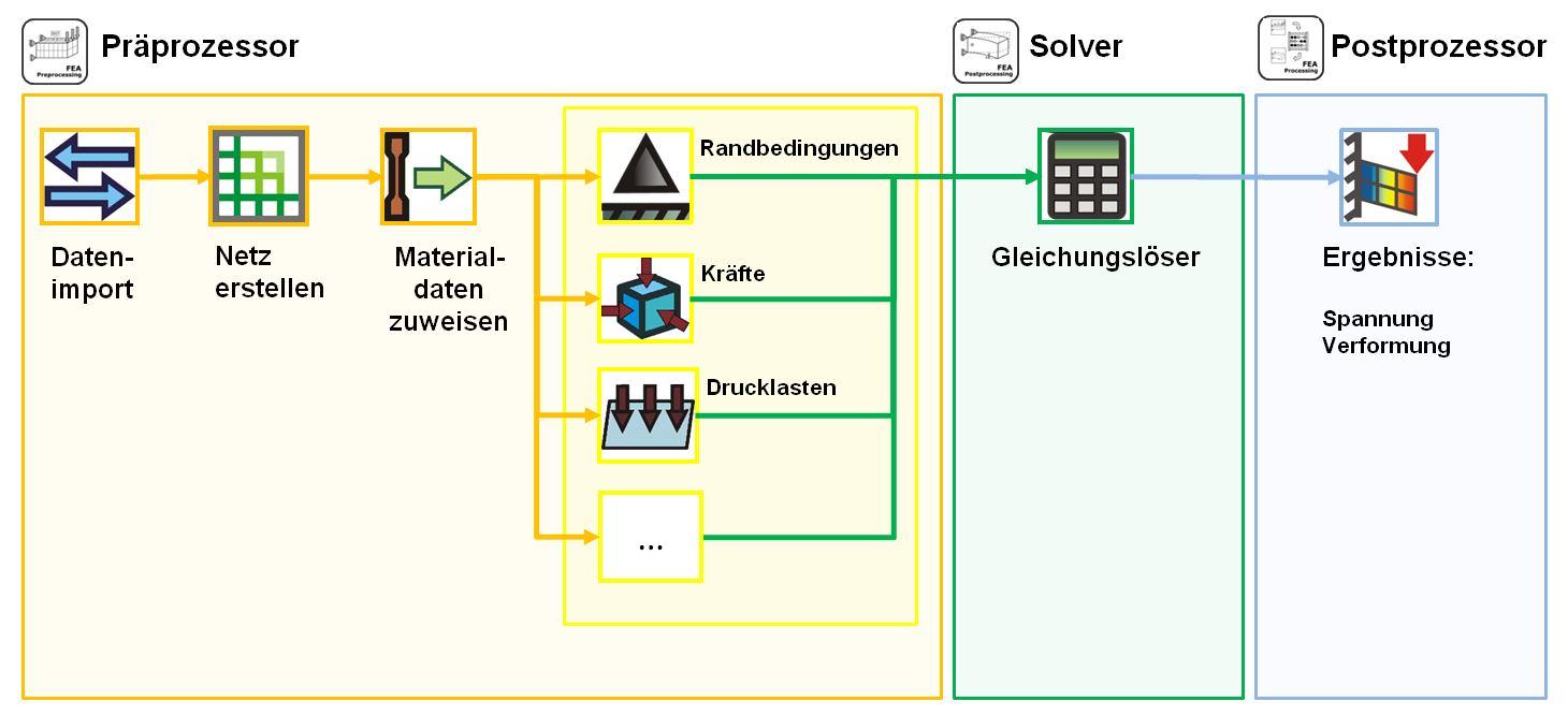 Ablauf der linearen Festigkeitsberechnung